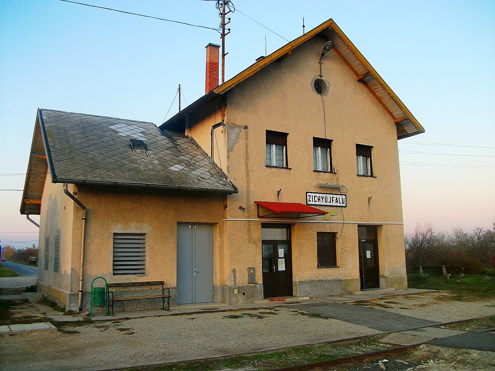 Zichyújfalu község vasútállomása. Unknown